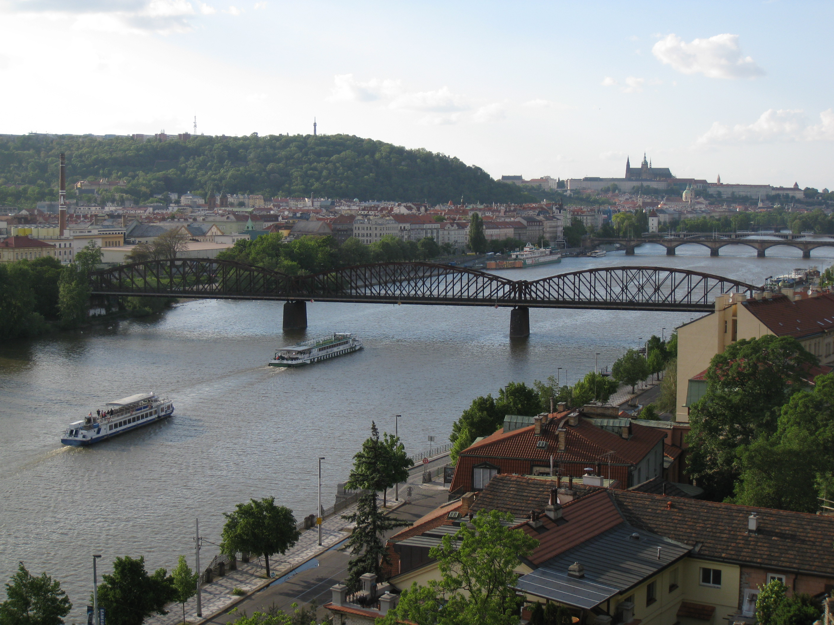 Soubor železničních mostů na trati Praha hlavní nádraží - Praha-Smíchov, Smíchov: parcely č. 5077/1 (smíchovská část mostu přes Vltavu), 561 (úzký pobřežní pás na smíchovské straně Vltavy), 5030/1 (úsek trati od mostu přes Vltavu k Nádražní ulici; zahrnuje most přes Hořejší nábřeží a most přes ulici Svornosti), Vyšehrad: parcely č. 281 (vyšehradská část mostu přes Vltavu), 279/2 (pilíř mostu na Rašínově nábřeží), 267/2 a 267/3 (úsek mezi Rašínovým nábřežím a mostem v prodloužení osy Podskalské ulice), 284/1 (od mostu přes Vyšehradskou ulici k podchodu v prodloužení Přemyslovy ulice).